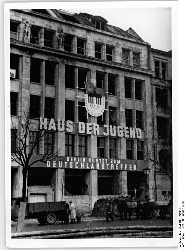 Berlin, Unter den Linden, "Haus der Jugend", Ruine Haus der Jugend. Das neue "Haus der Jugend" in Berlin, Unter den Linden 35 Aufn.Illus Funck 9.1.50